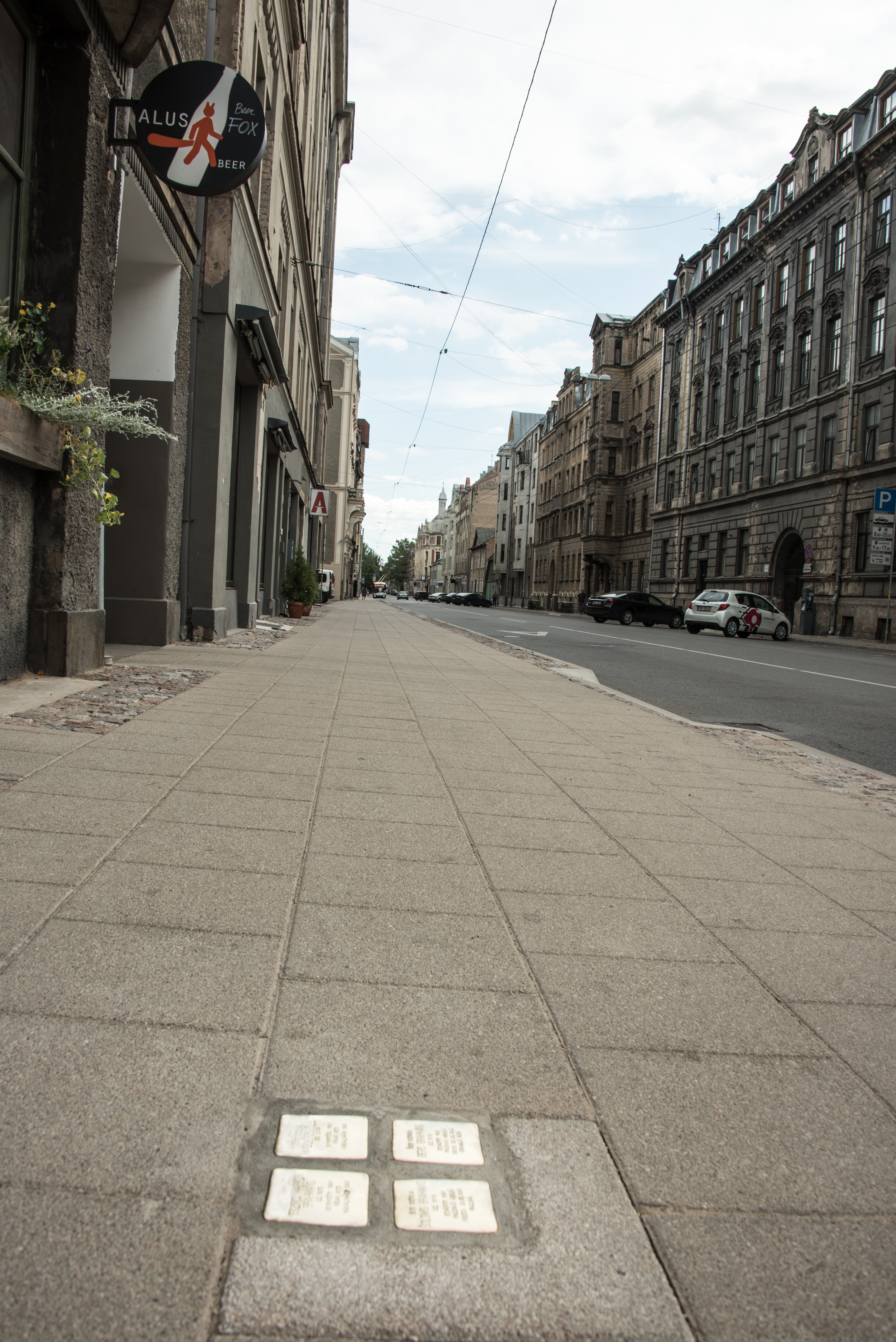 Stolpersteine für Familie Brahmans, Stabu iela 59